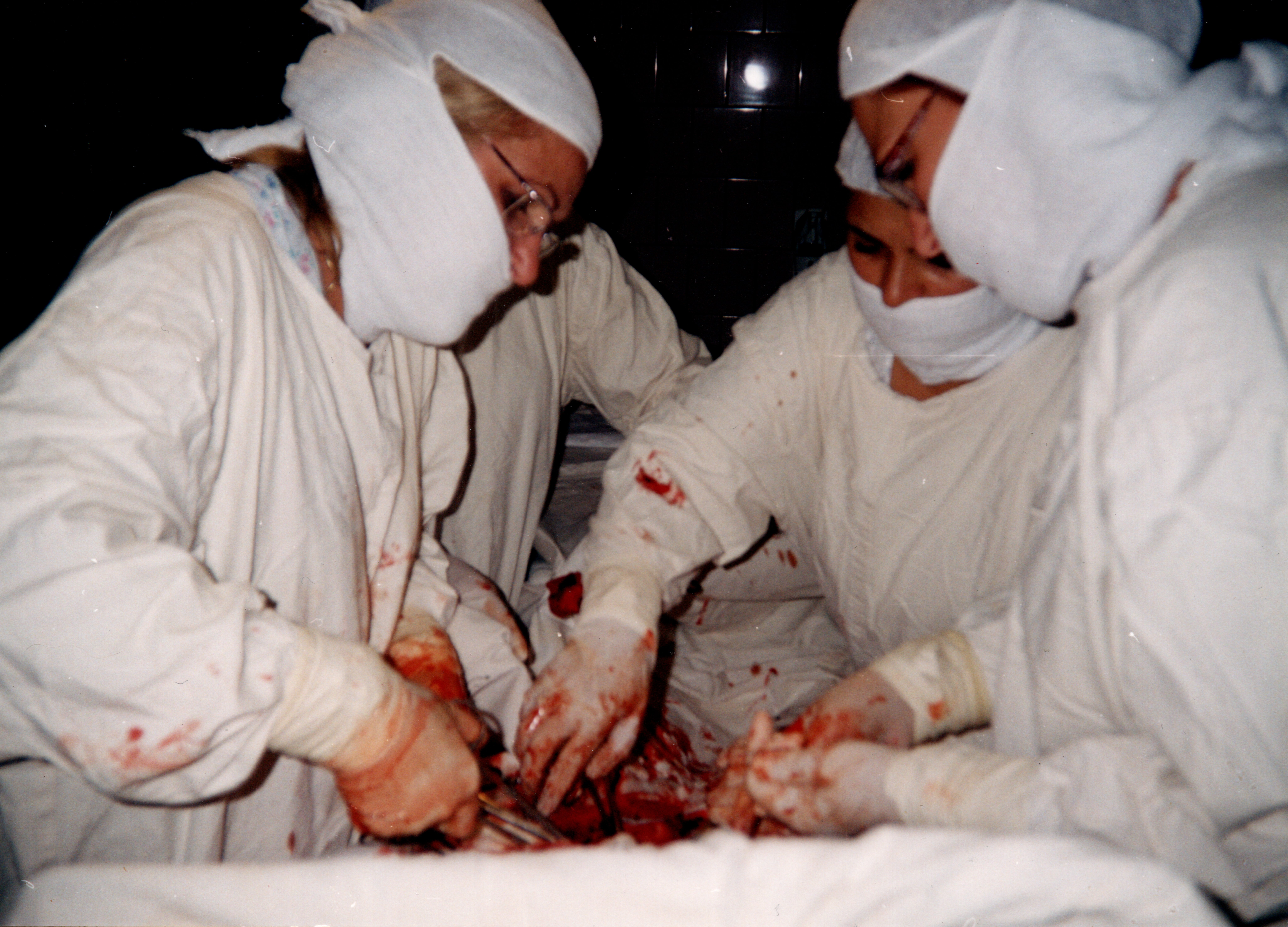 Операція за участі Падалко Людмили Іванівни (ліворуч)